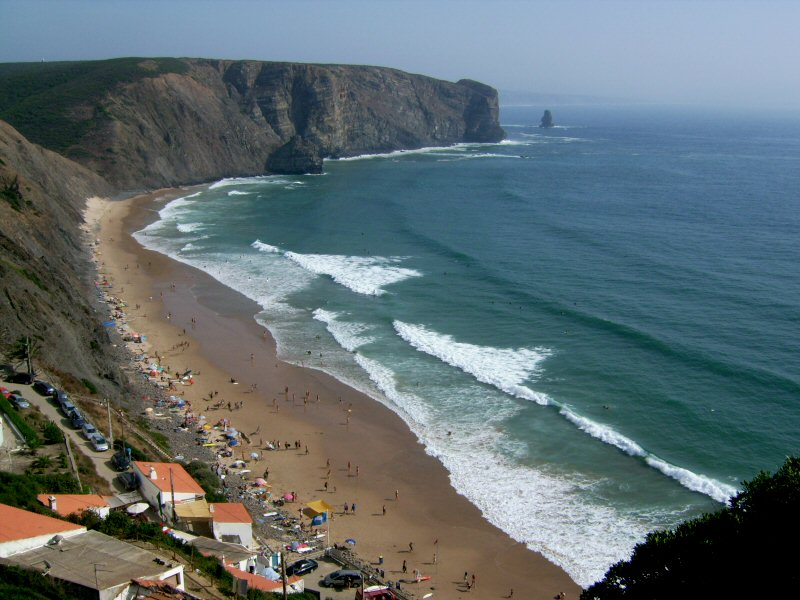 Praia da Arifana - I